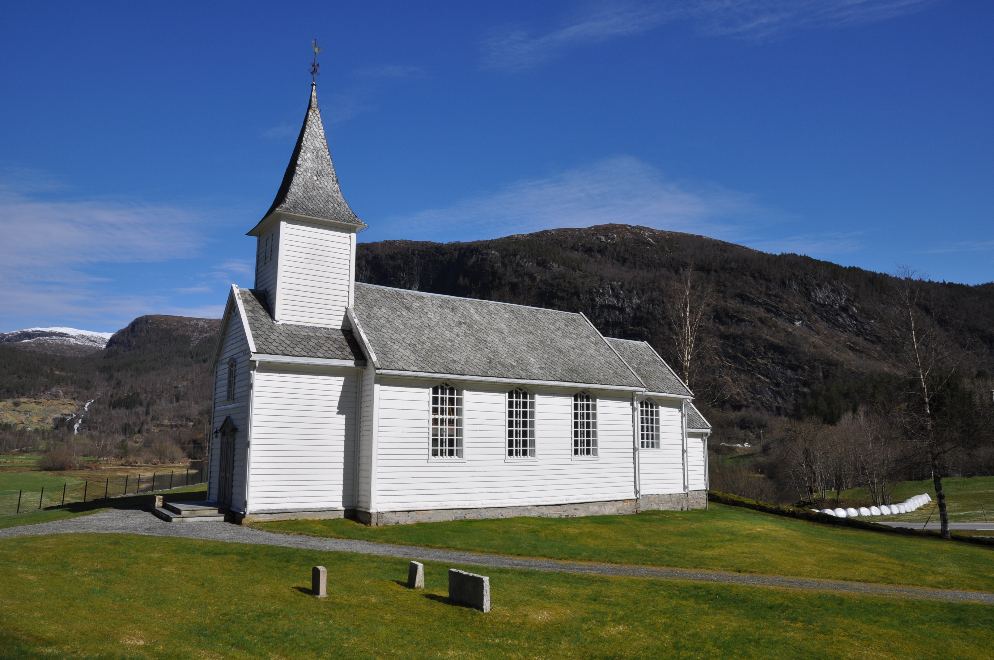 Guddal kyrkje står i Guddal søraust i Fjaler kommune i Sogn og Fjordane, og er ei langkyrkje som plar daterast til 1870, sjølv om delar av kyrkja er frå 1686. I 1870 vart den gamle kyrkja utvida, og samstundes fekk heile bygget ny kleding og det vart lagd nytt golv og panel inne. Kyrkja fekk òg eit tårn. 25. september 1870 vart kyrkja vigsla på nytt. Til jubileet i 1970 vart kyrkja pussa opp igjen. I mellomalderen stod det ei stavkyrkje i Guddal, denne vart truleg riven på 1600-talet. Guddal kyrkje høyrer til Fjaler sokn i Sunnfjord prosti. Guddal var tidlegare eit eige kyrkjesokn, men sokna i det tidlegare prestegjeldet er no ihopslegne til eitt sokn. (Kjelde: Nynorsk Wikipedia)